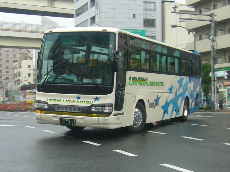 登録番号 練馬200け・・11 浦和中央交通所属 2007年7月22日 木場五丁目交差点にて撮影